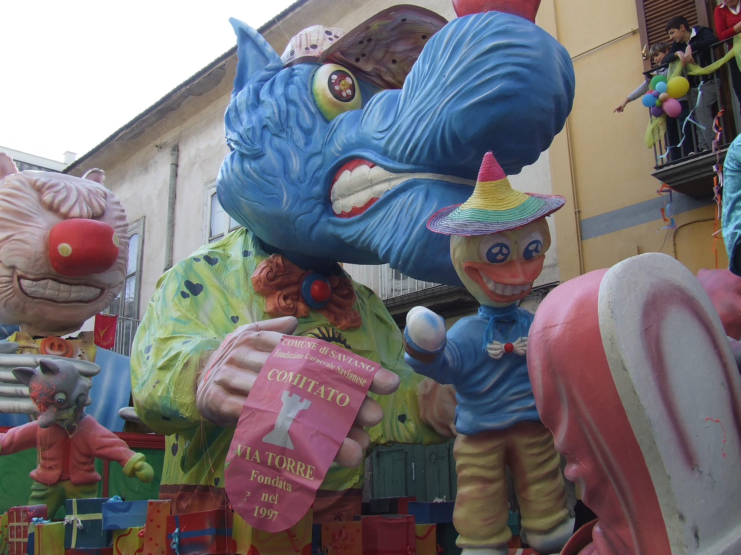 Carnevale di Saviano - Carri allegorici